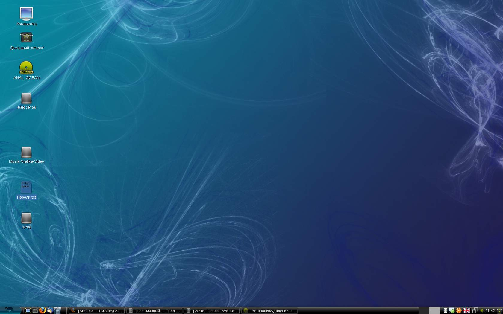 рабочий стол дистрибутива GNU\Linux Runtu 3